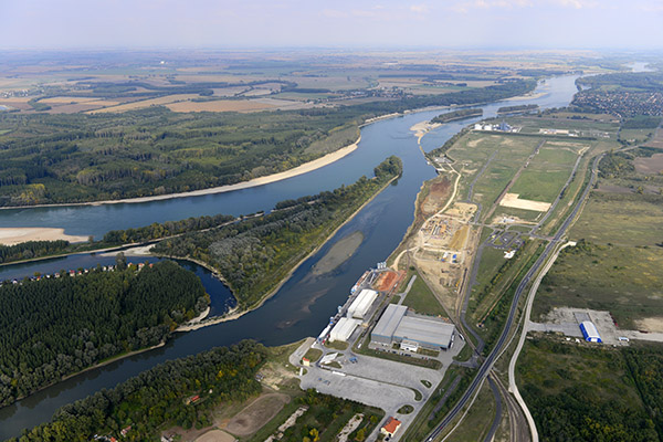 A gönyűi kikötő és épülő logisztikai park a levegőből